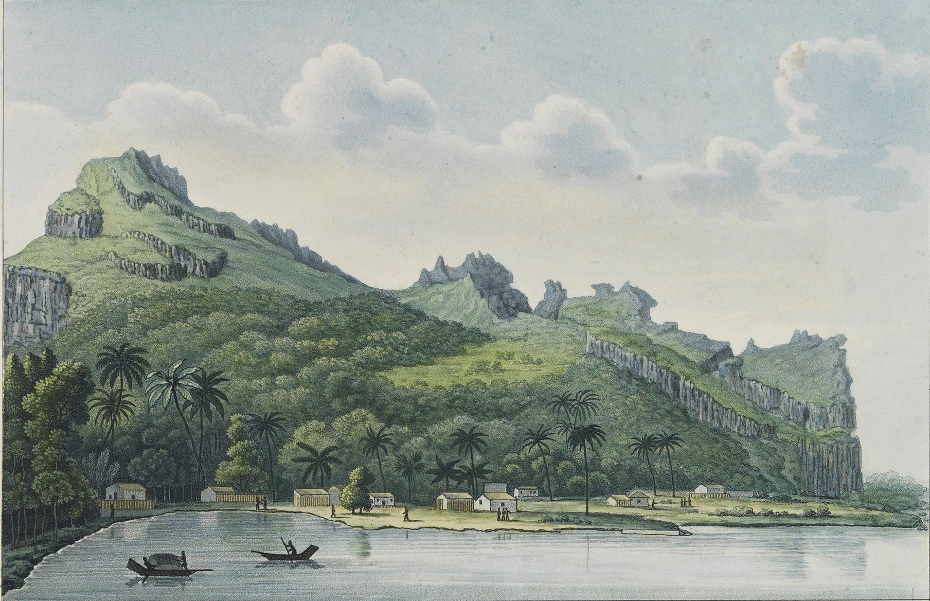 Vue de la partie méridionale de l'Ile Maupiti et du village d'Atipiti